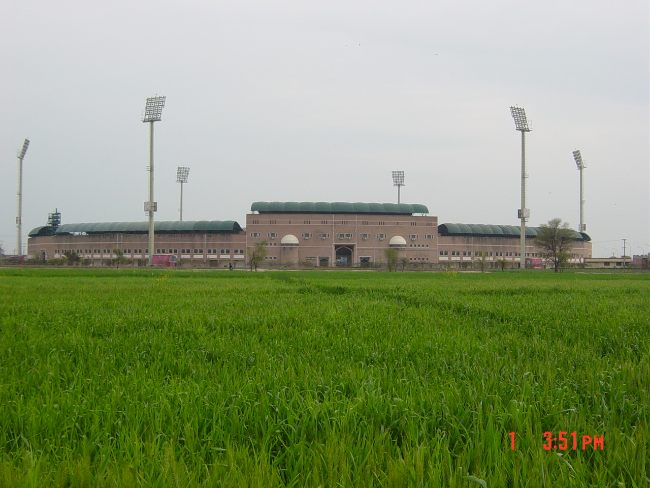 Ali Town, Multan, Pakistan